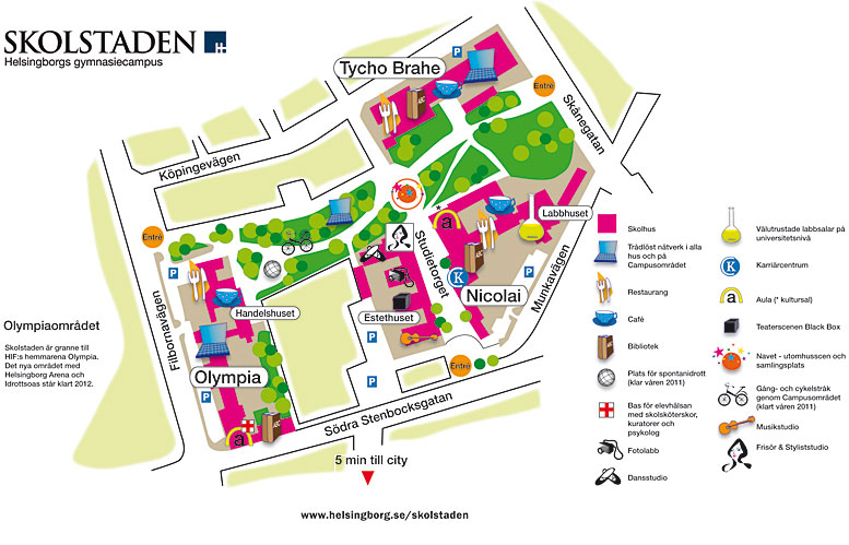 Karta över Skolstadens campusområde